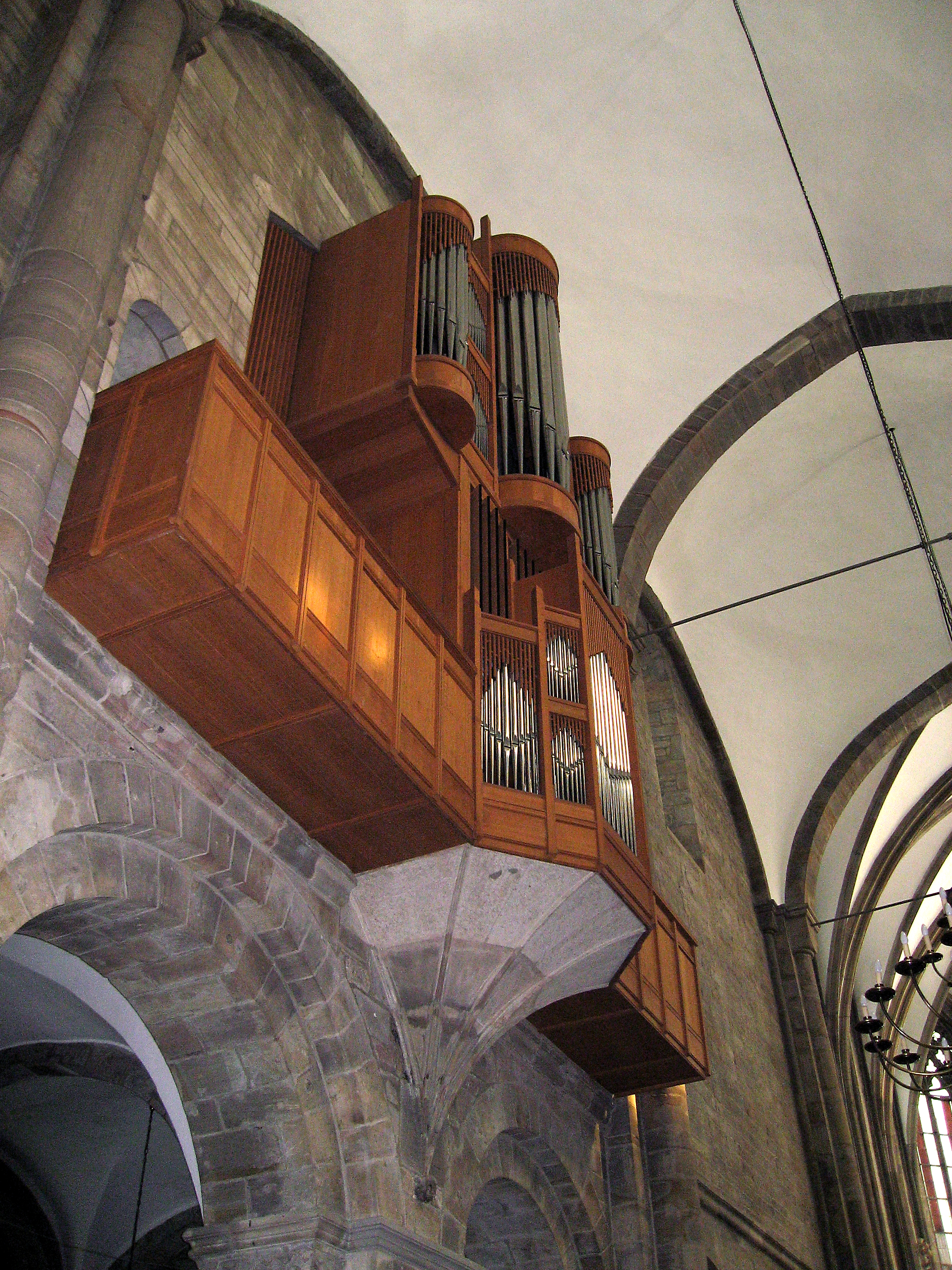 Marienkirche Dortmund, Holzfigur von der im Zweiten Weltkrieg zerstörten Kanzel, Südwand Hauptschiff beim Westeingang